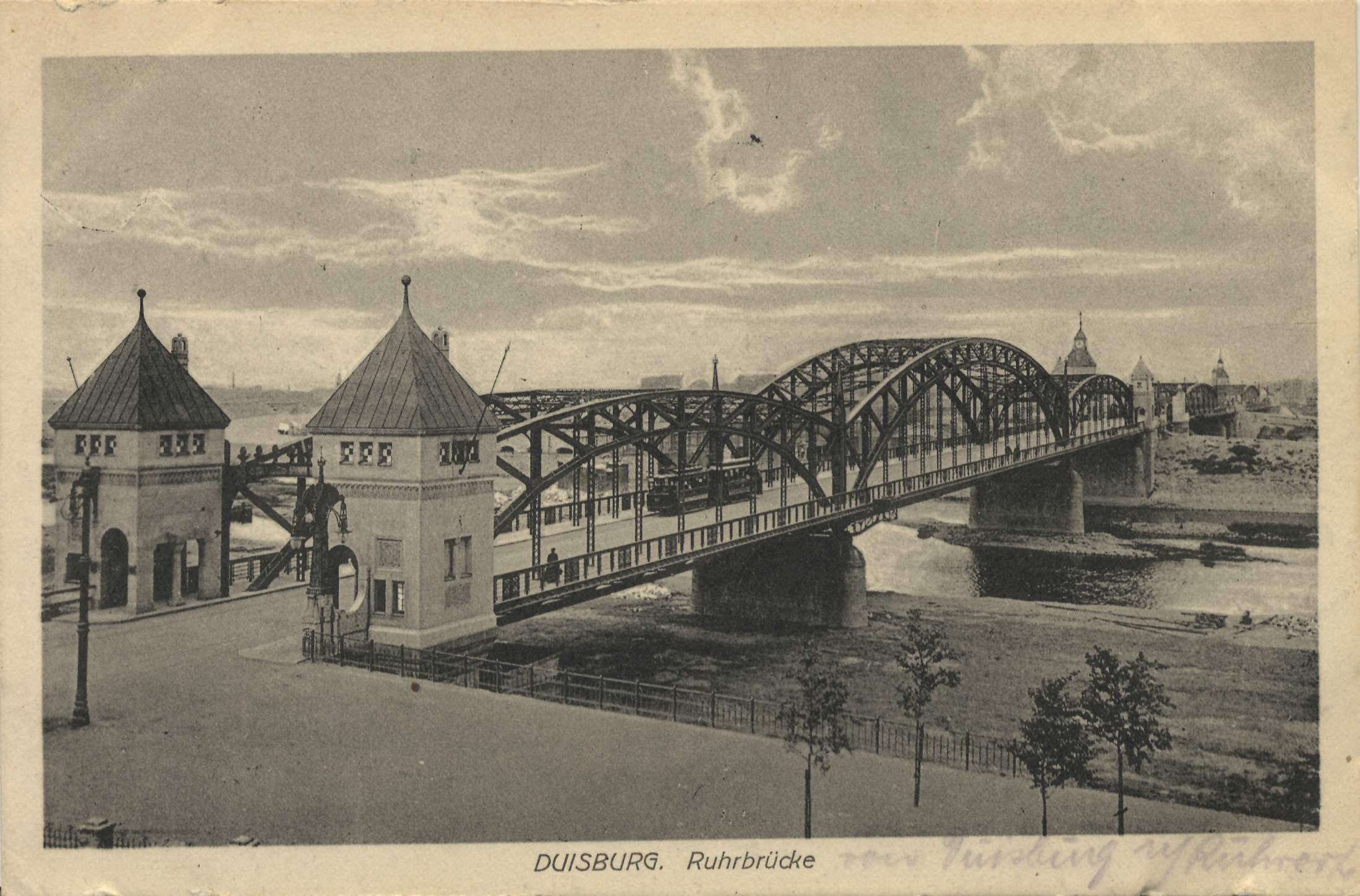 Historische Postkarte der Karl Lehr Brücke zwischen Kasslerfeld und Ruhrort aus dem Verlag: Cramers Kunstanstalt, Dortmund, von 1915